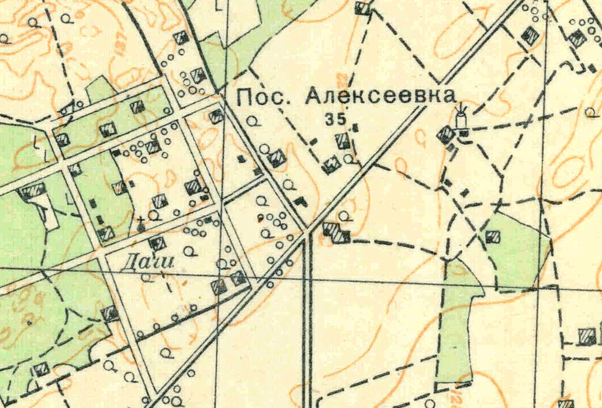 Топографическая карта Ленинградской области, квадрат О-35-24-Б-в (Вохоново), деревня Алексеевка